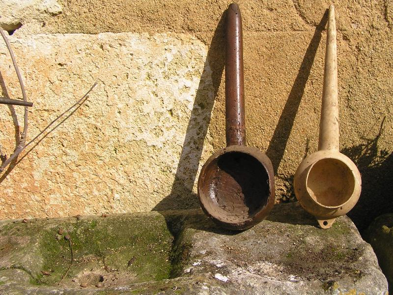 cassotte en bois et cassotte en plastique, photo fournie par Rosier (de WP) pour illustrer l'article sur la cassotte sur wikipedia.